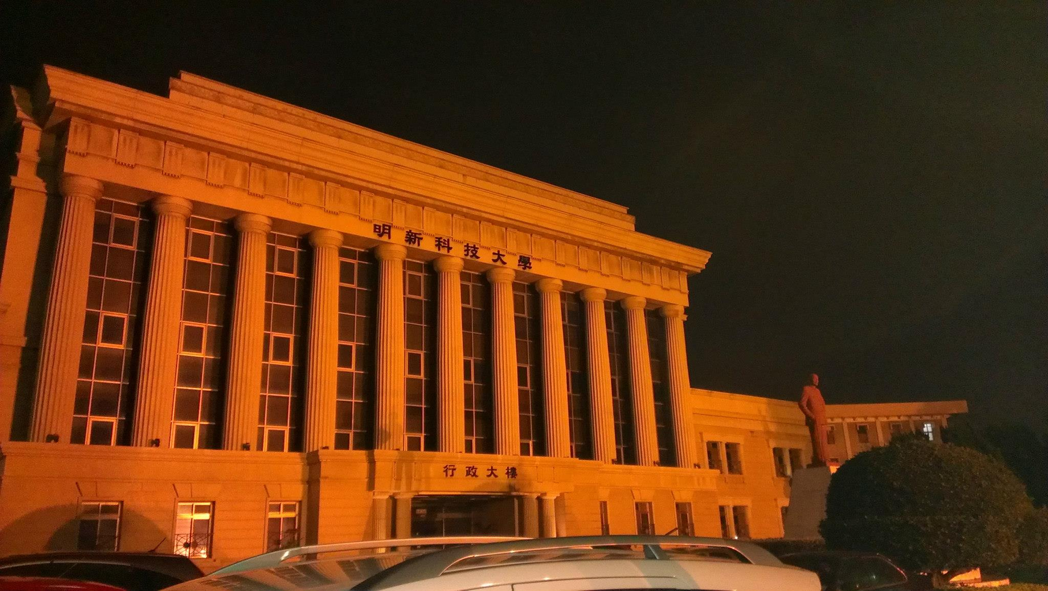 中文（台灣）: 明新科大夜晚時行政大樓.